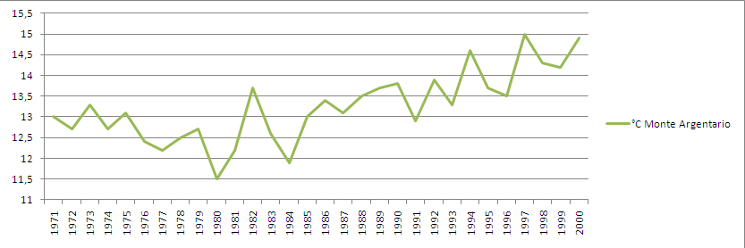 Stazione meteorologica di Monte Argentario: andamento della temperatura media annua dal 1971 al 2000.